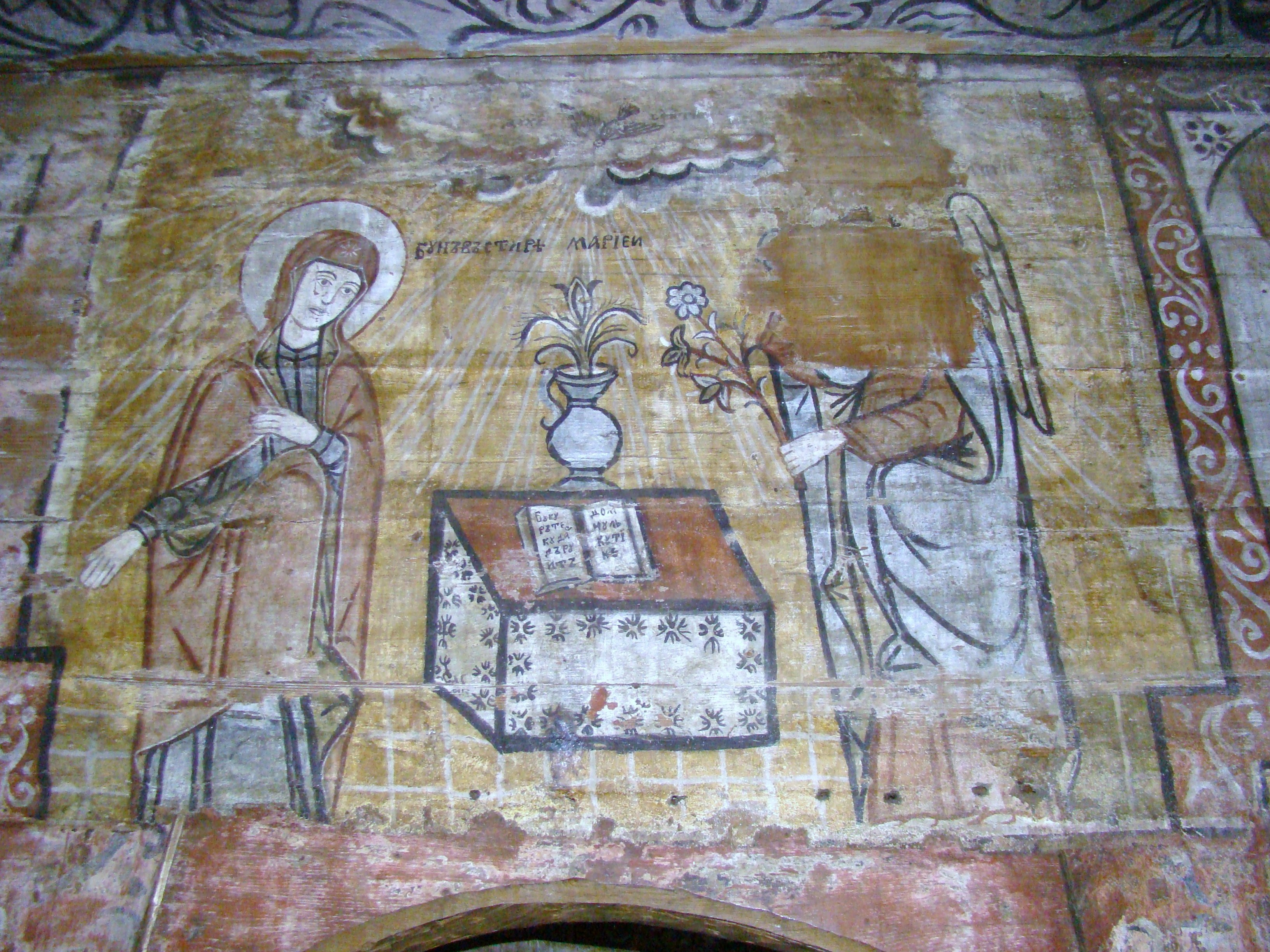 Biserica de lemn "Naşterea Maicii Domnului", sat IEUD